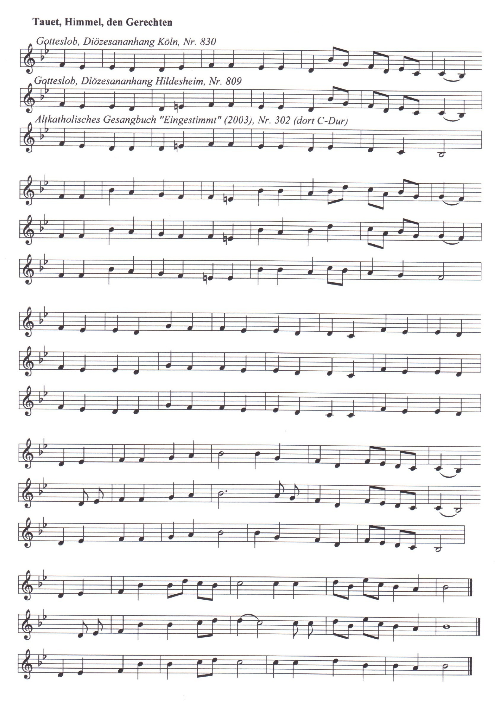 Drei Versionen der Melodie Tauet, Himmel, den Gerechten von Norbert Hauner (Gotteslob Anhang Köln, Gotteslob Anhang Hildesheim, Altkath. Gesangbuch "Eingestimmt")